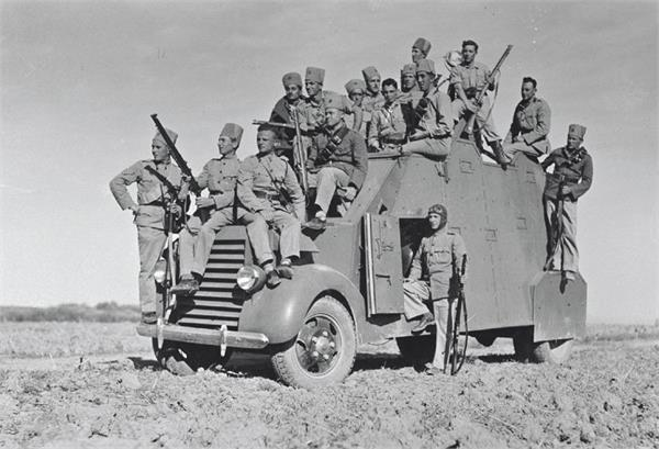 כפר רופין - המשוריין ביום העליה